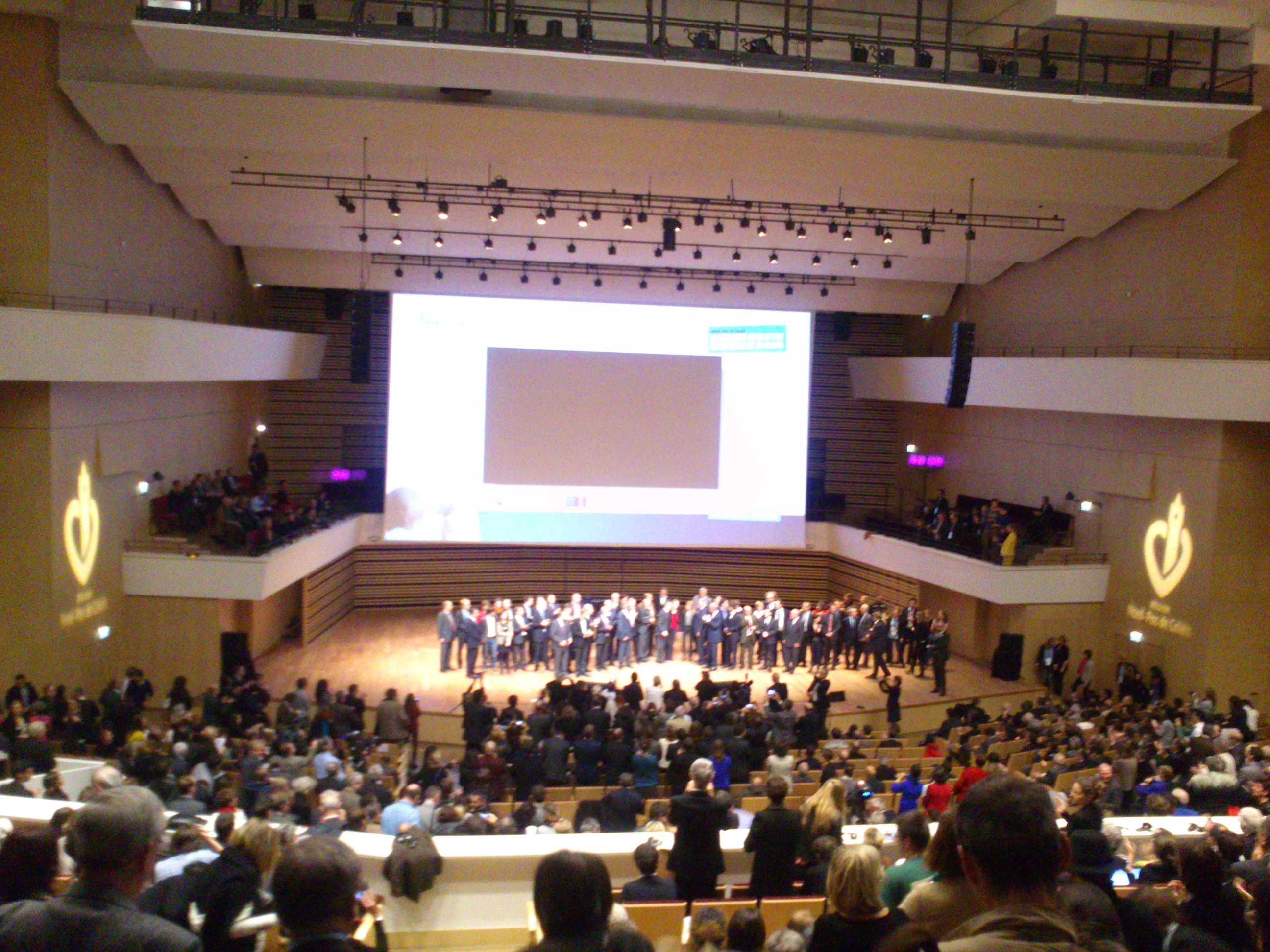 World Forum Lille 2013 Présentation du Master plan de Jeremy Rifkin